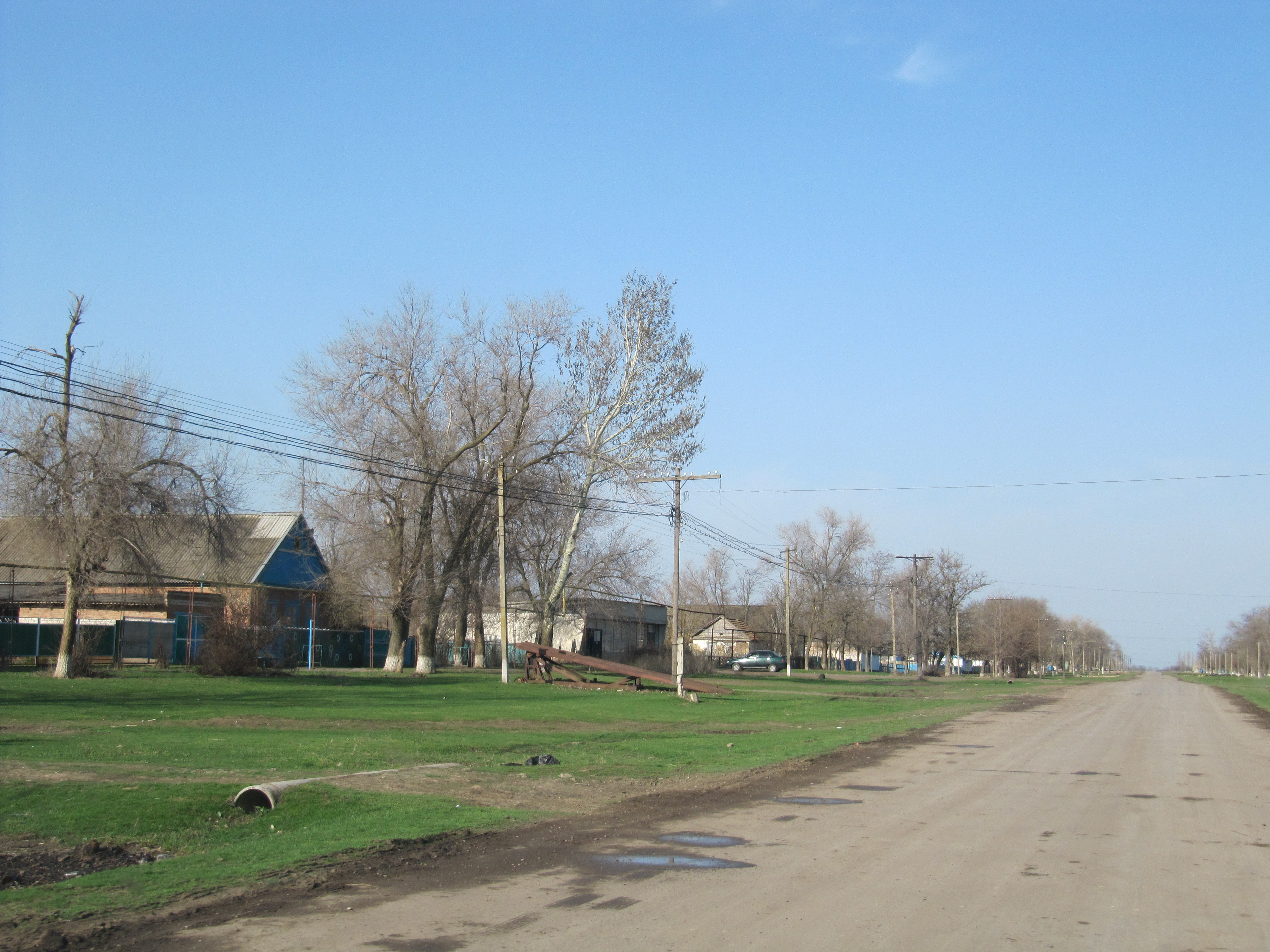 Село Виноградное, Городовиковский район, Калмыкия